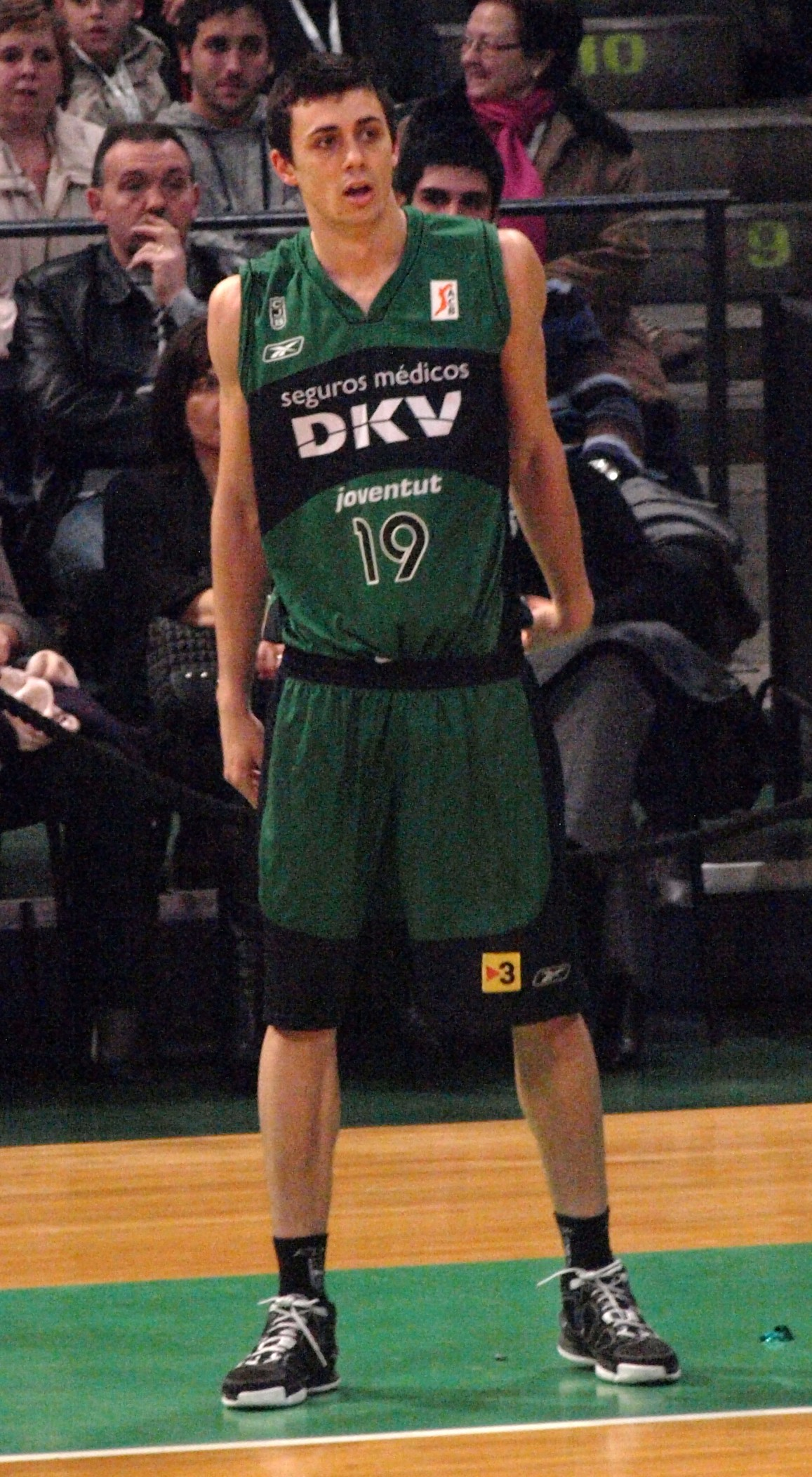 Pere Tomás, en el partido que enfrentó al DKV Joventut y al CB Murcia en el olímpico de Badalona en enero de 2009